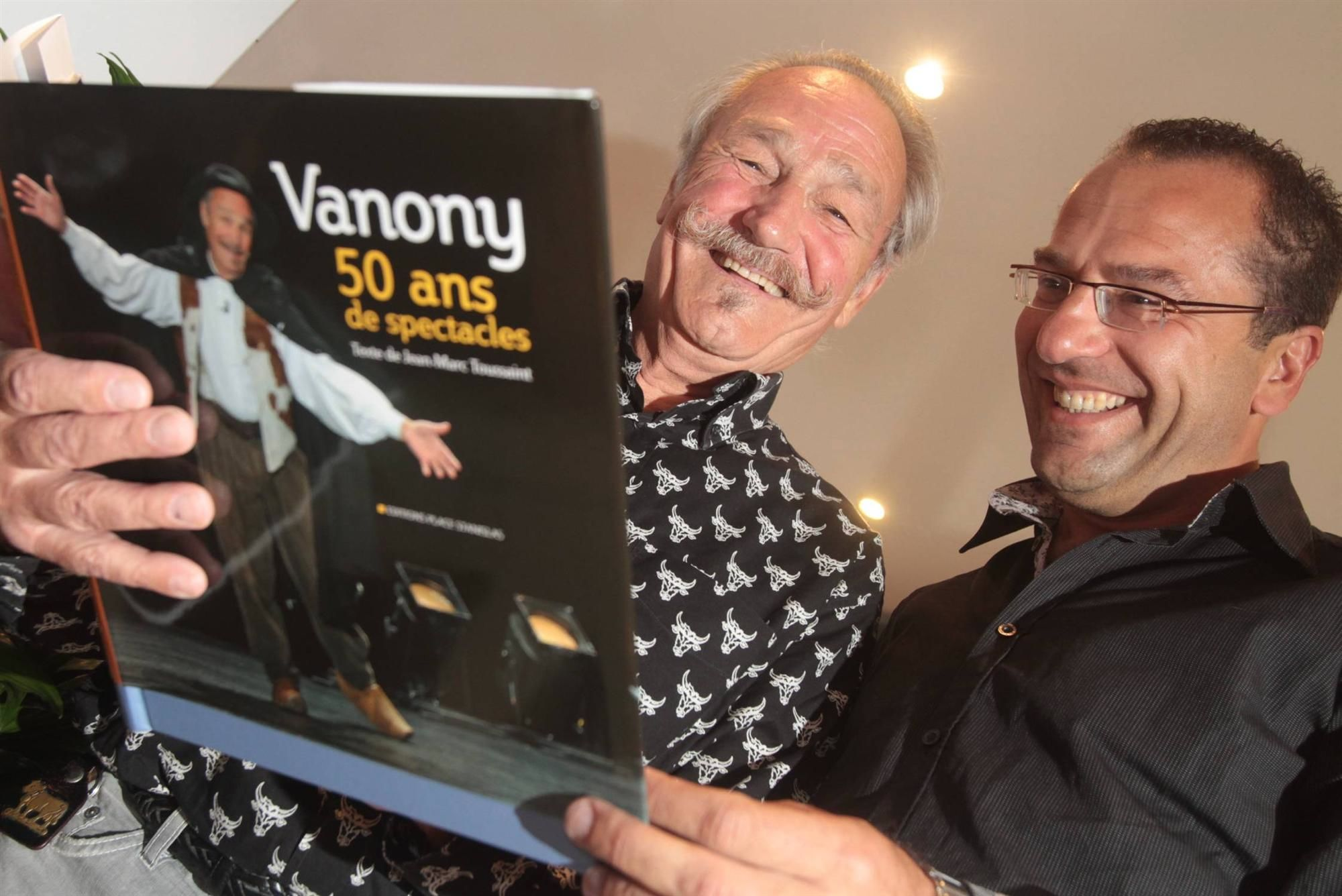 Claude Vanony en compagnie de Jean-Marc Toussaint, le journaliste qui a écrit son second livre "50 ans de spectacle"